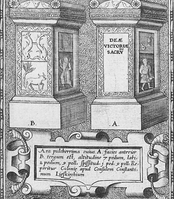 Ausschnitt des Mercator – Stadtplanes Köln. Detailzeichnungen, von Mercator als „antiquitates Coloniae“ bezeichnet, umranden den Kölner Stadtplan